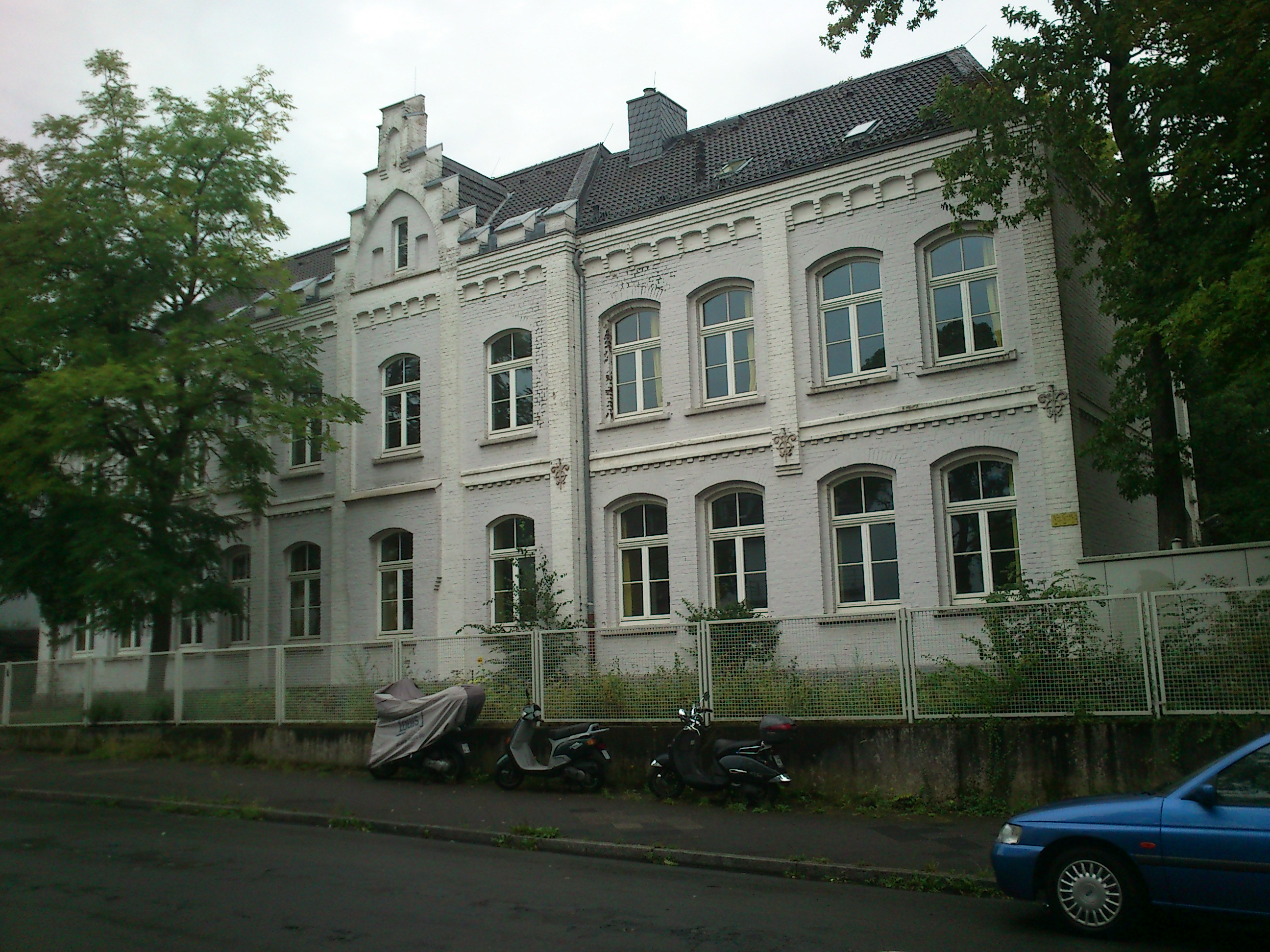 Düsseldorf-Gerresheim-Unter den Eichen-DNr. 1389This is a photograph of an architectural monument., no. 1389